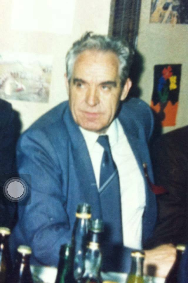 Osman Bilalli